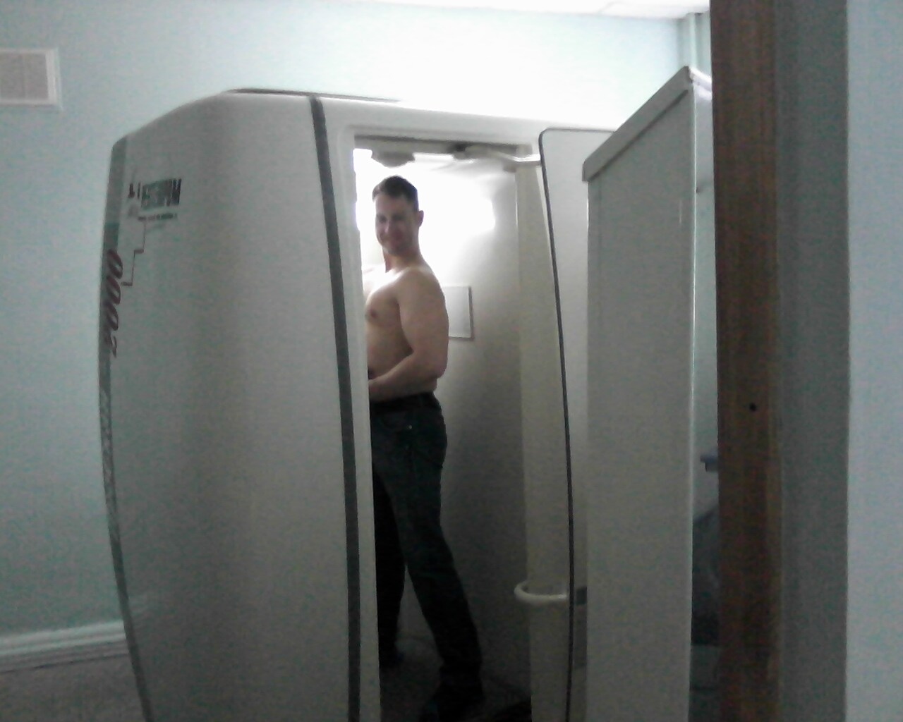 Цифровой флюорограф